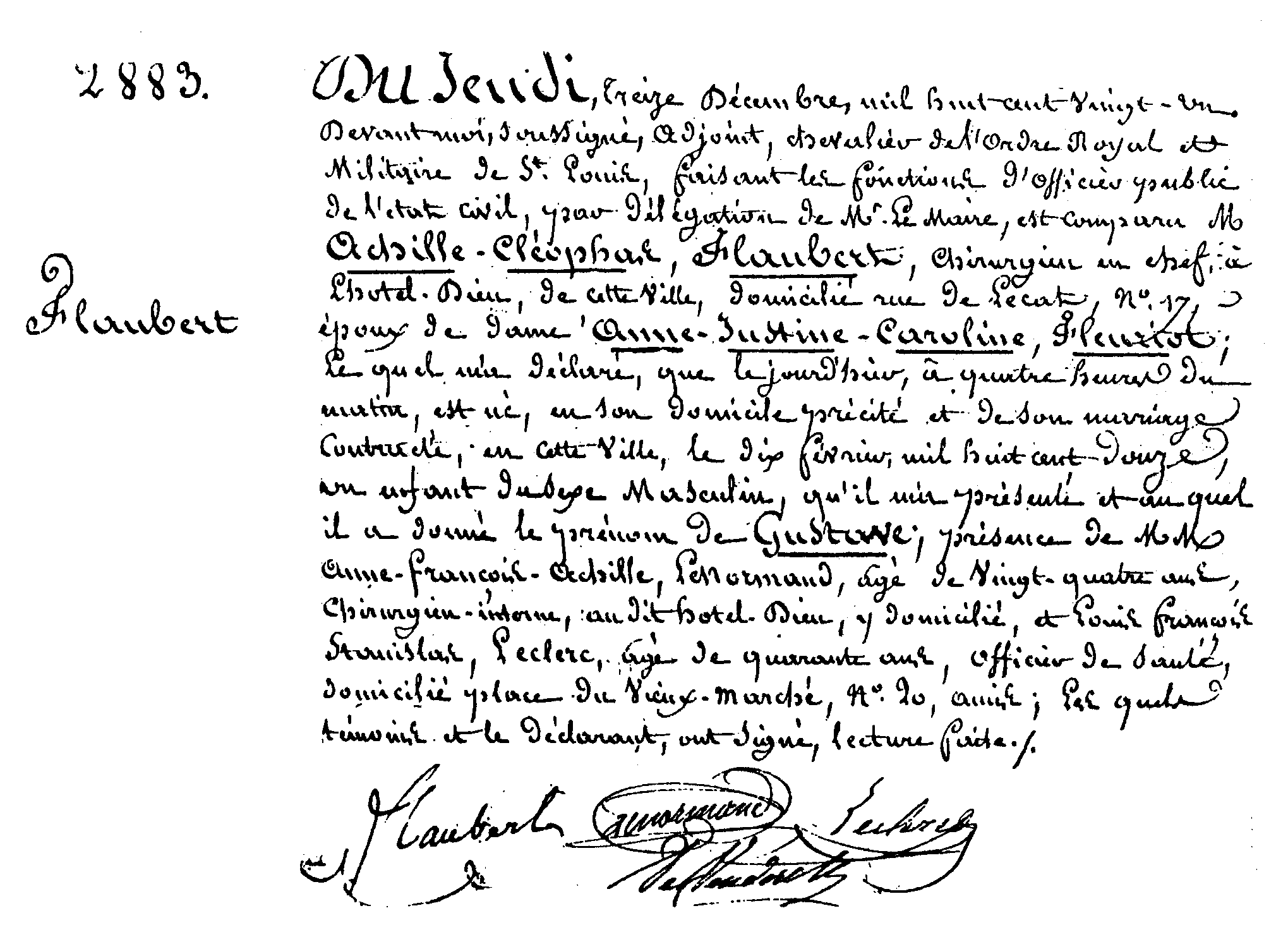 Acte de naissance de robert assita